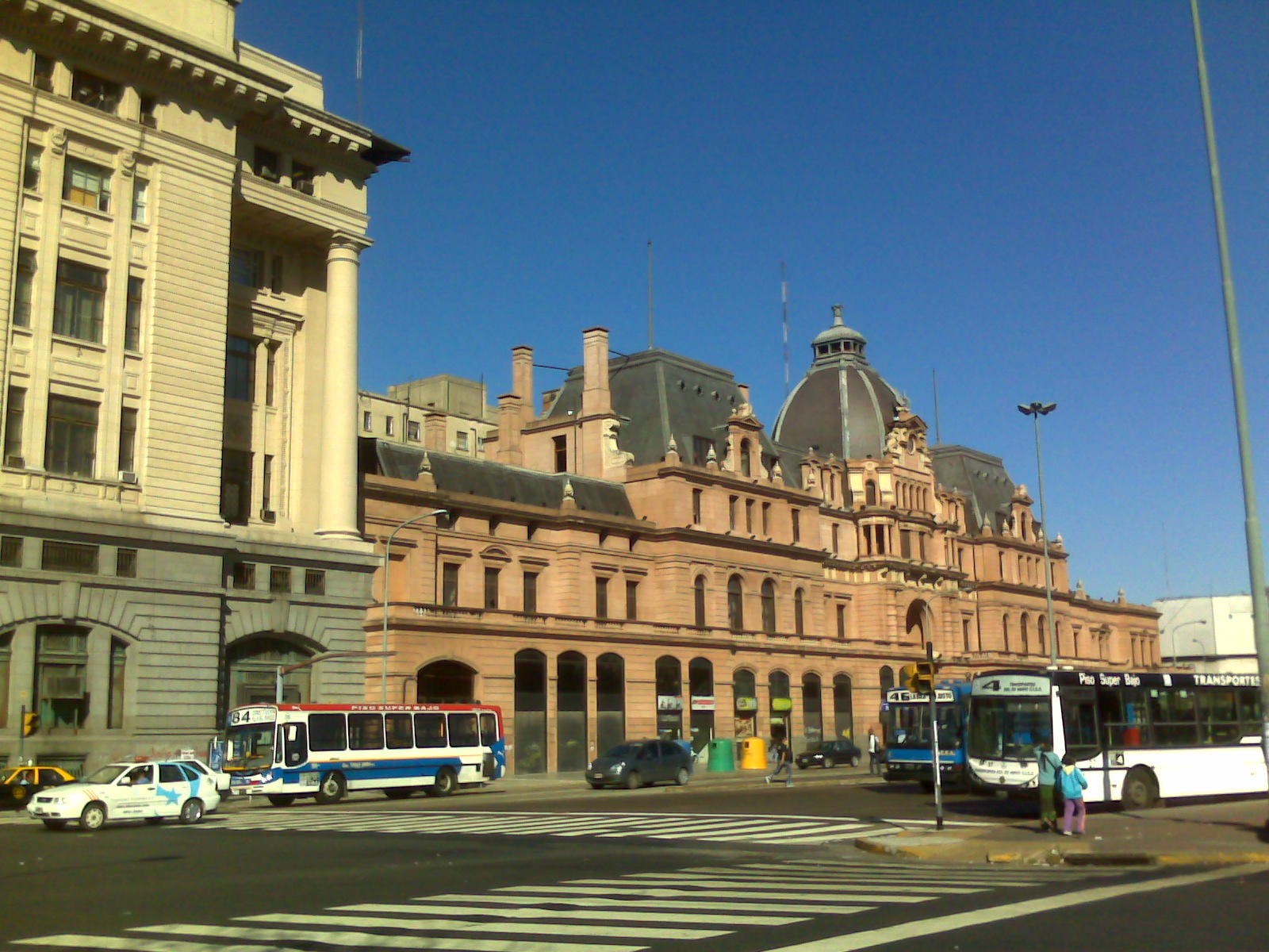 Constitución Railway Terminal, Buenos Aires, Argentina.